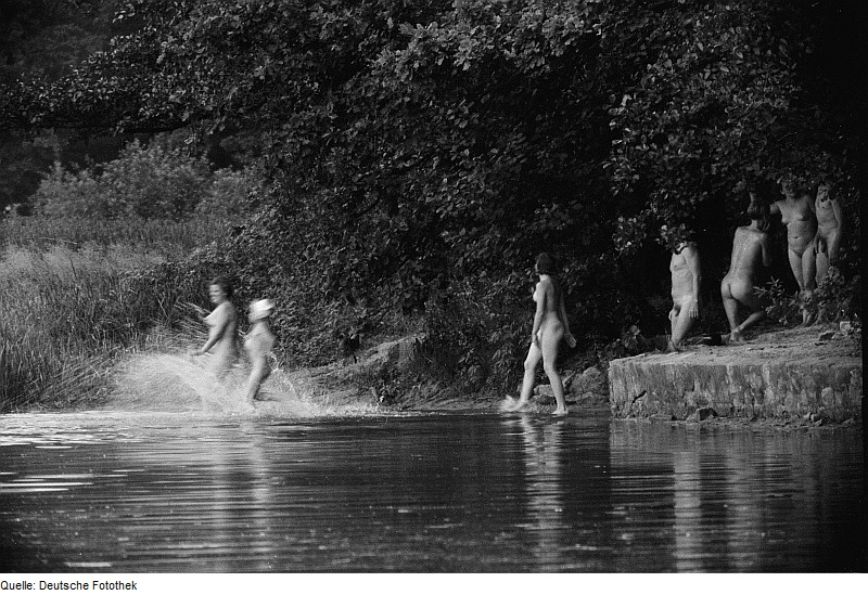 Original image description from the Deutsche FotothekBadende